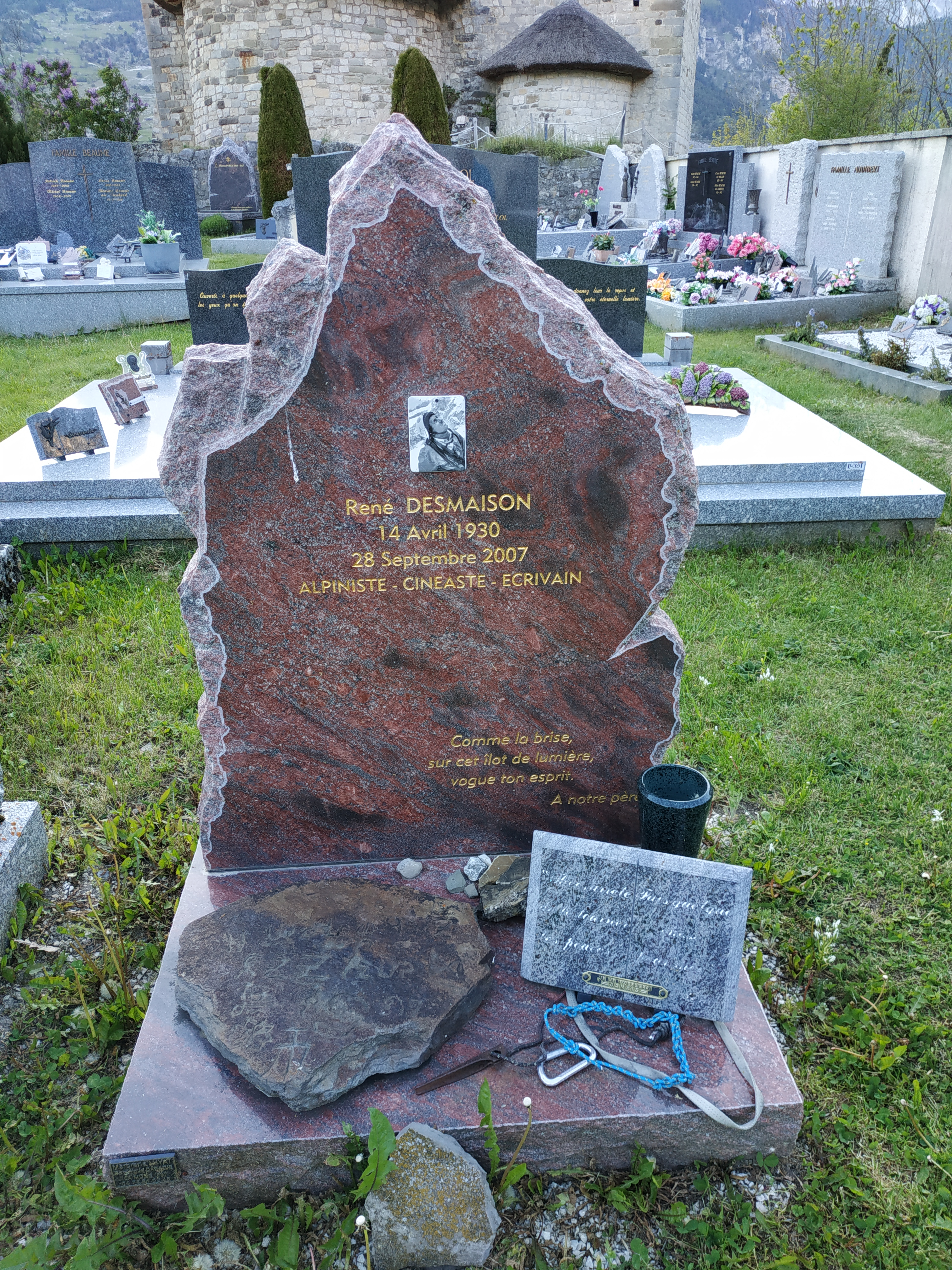 Tombe de René Demaison - (1930-2007) - Cimetière de Mère Eglise